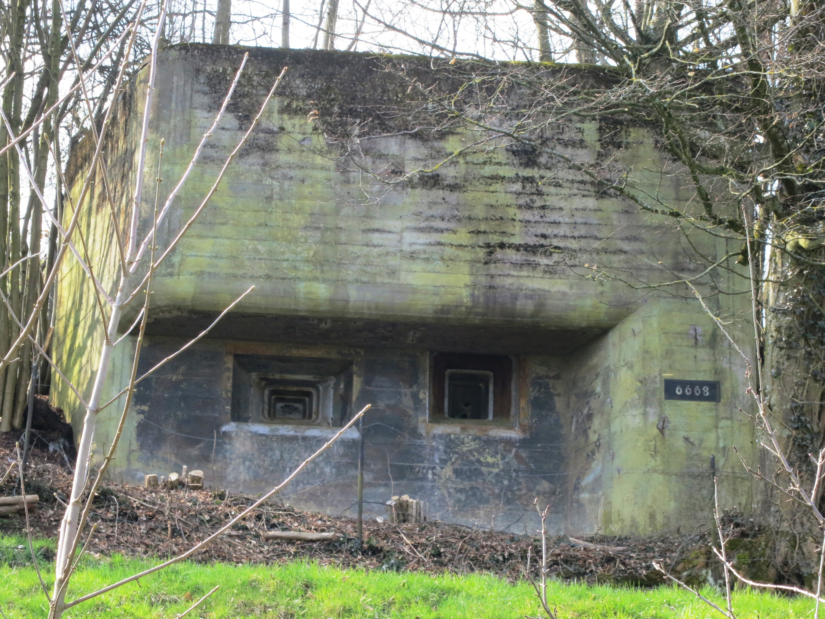 Sperrstelle Urdorf ZH, Schweiz: Moritz A 5207